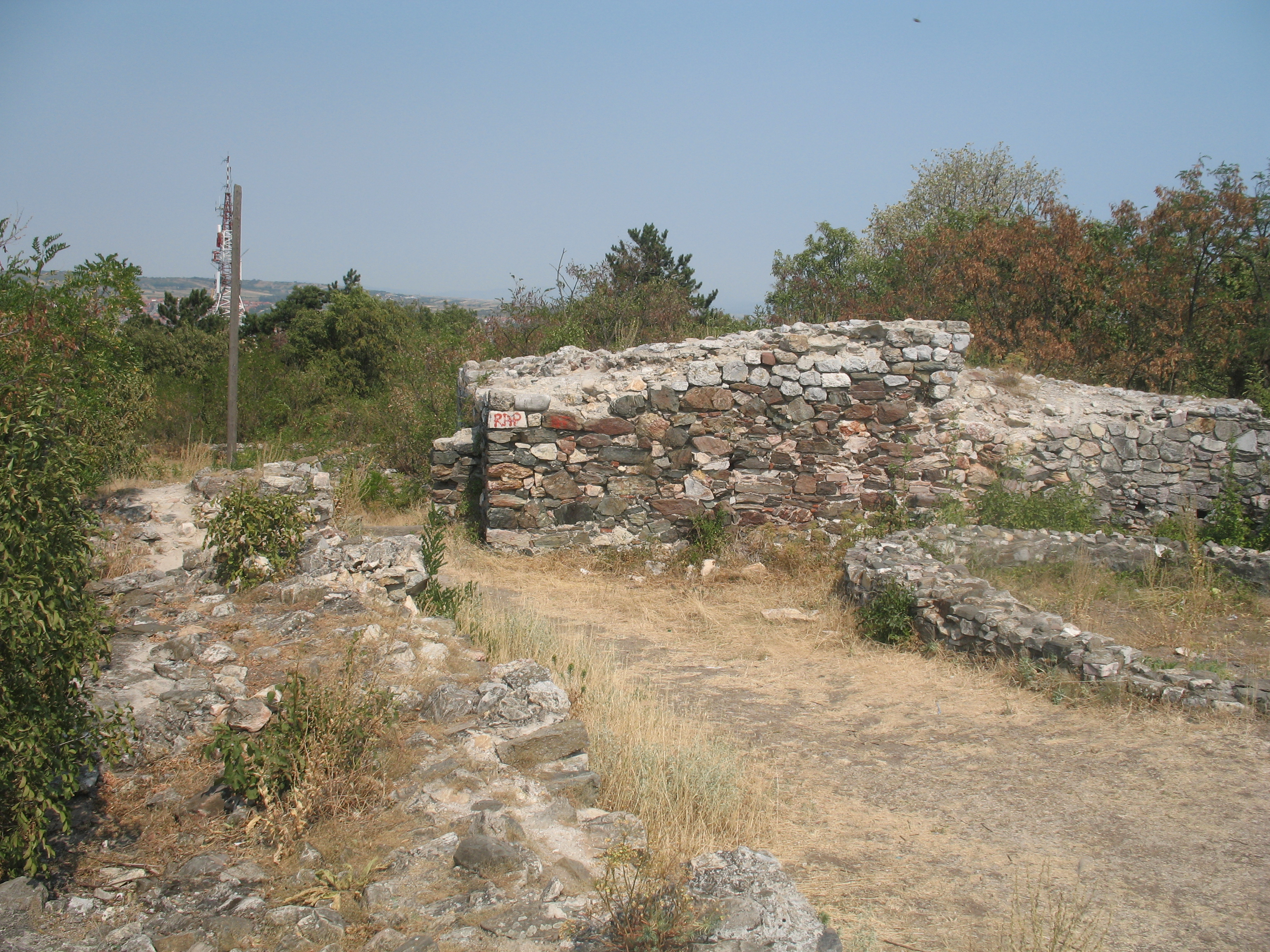 "Hisar" in Prokuplje